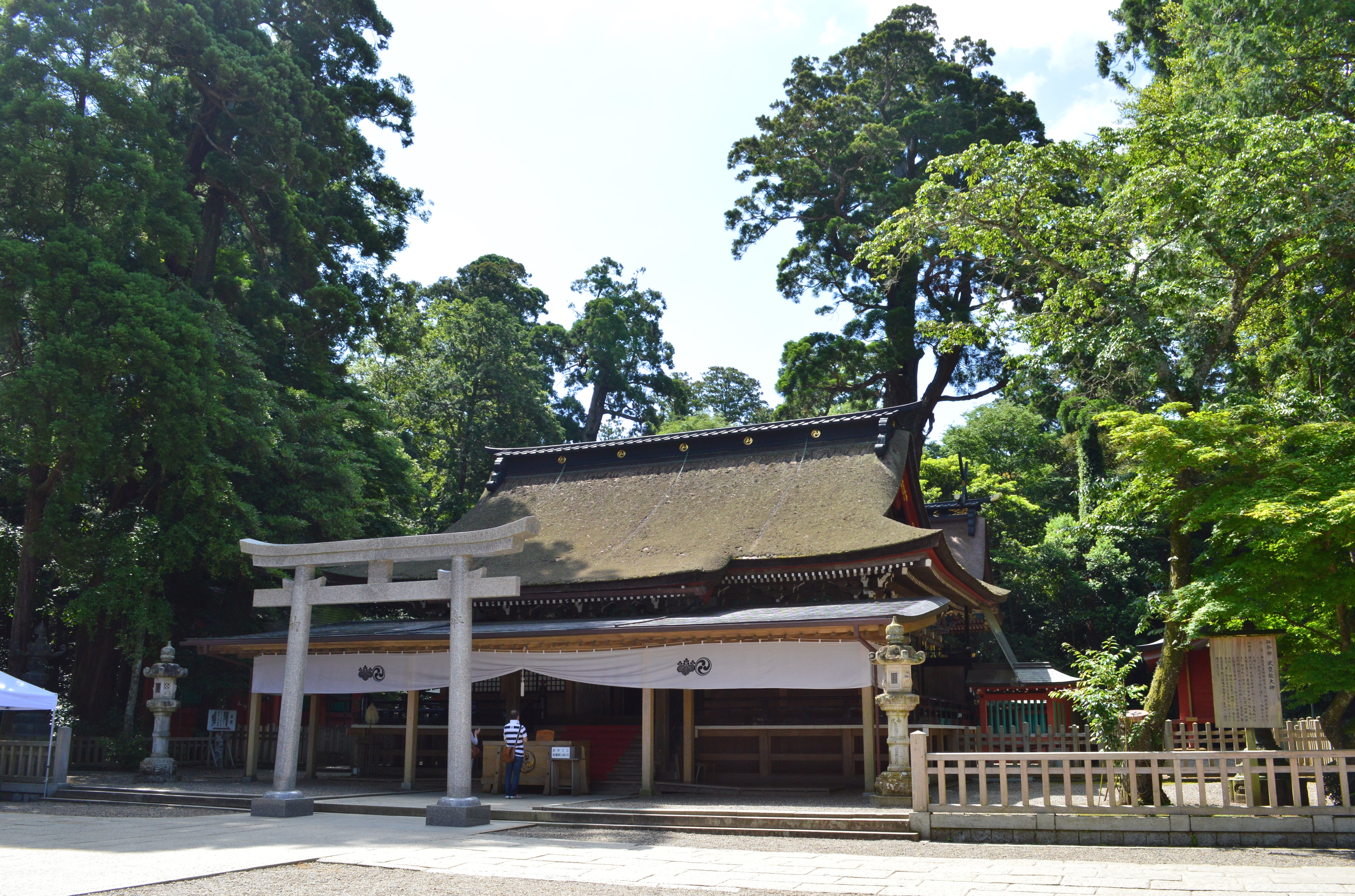 鹿島神宮 拝殿-2